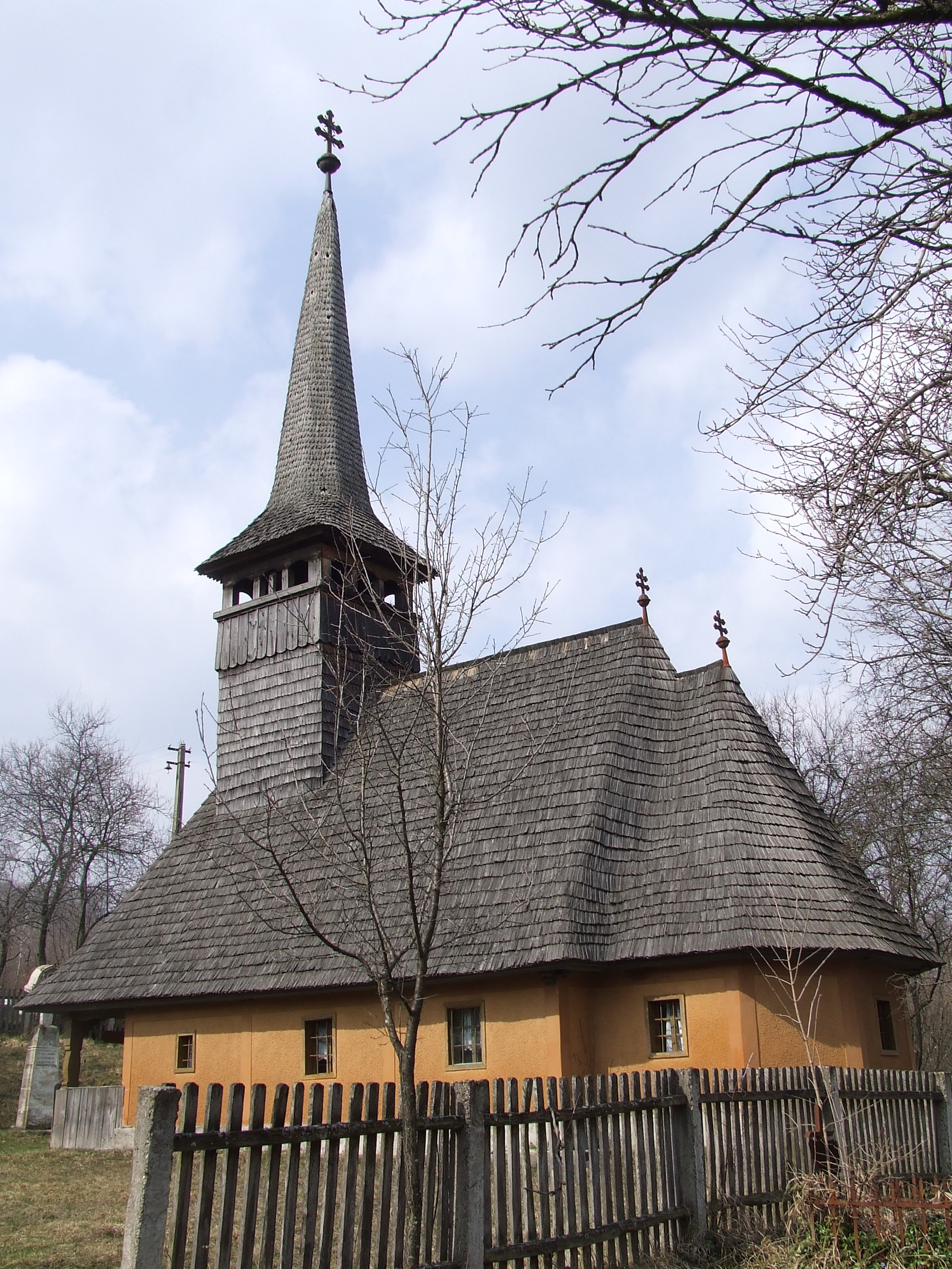 Biserica de lemn din Valea Loznei, judeţul Sălaj. Autor: Bogdan Ilieş Data: martie 2007